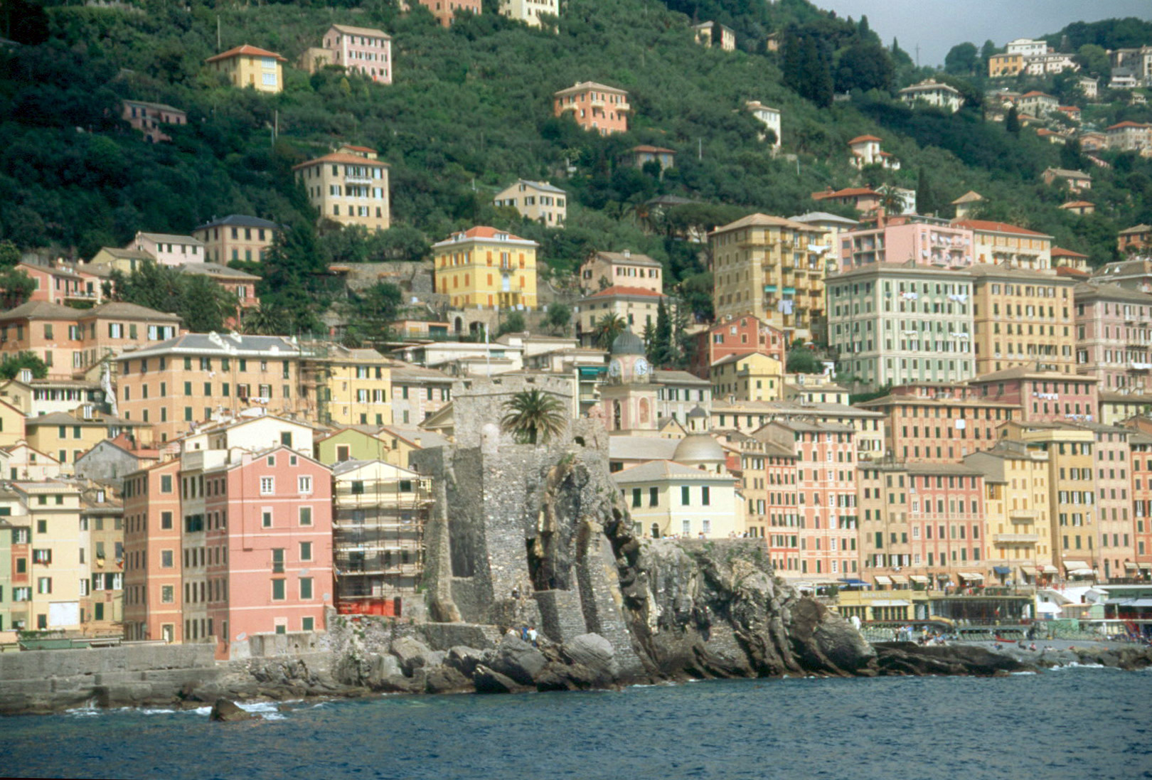 Camogli 2004